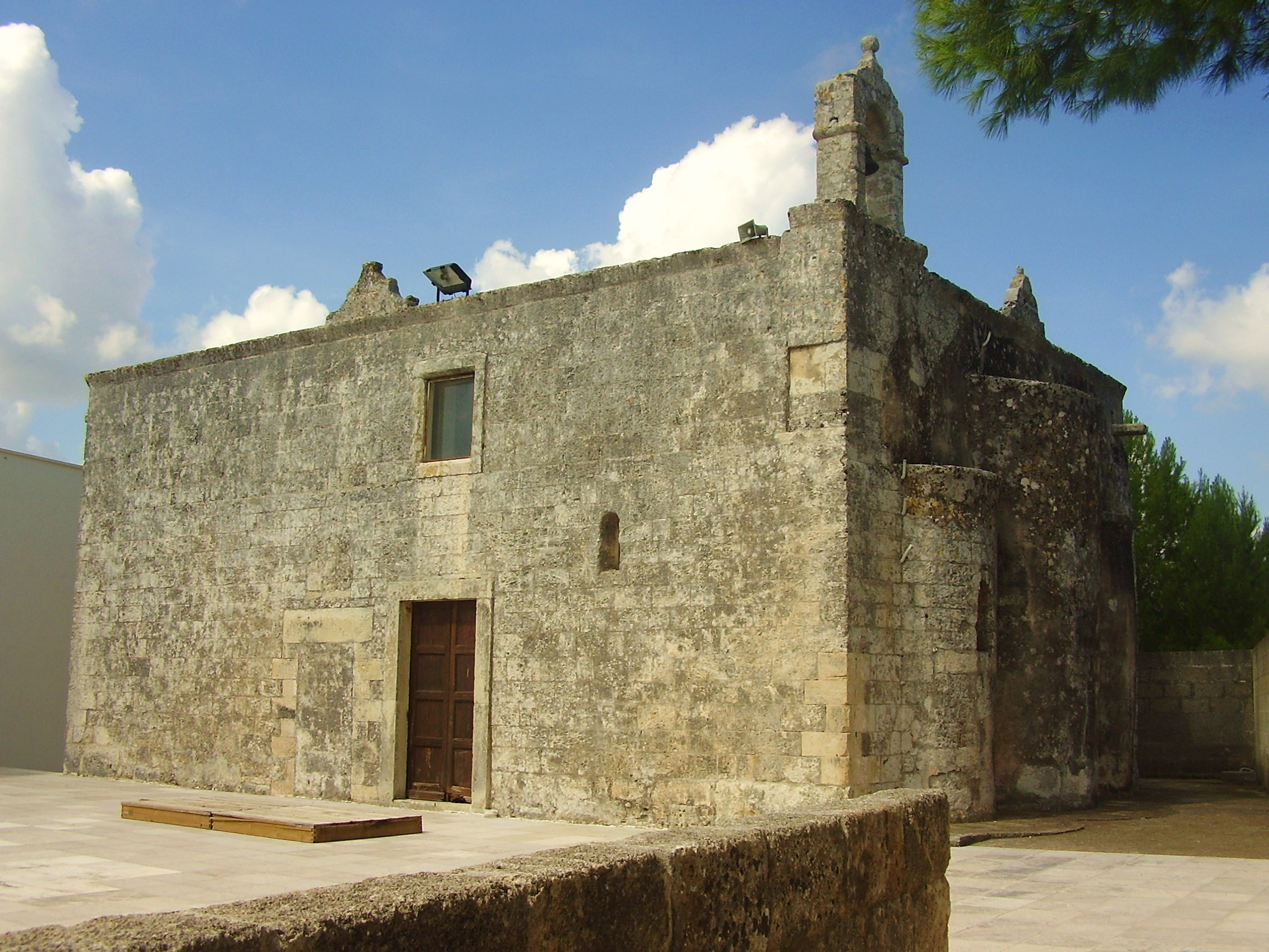 Chiesa San Salvatore Sanarica, Lecce